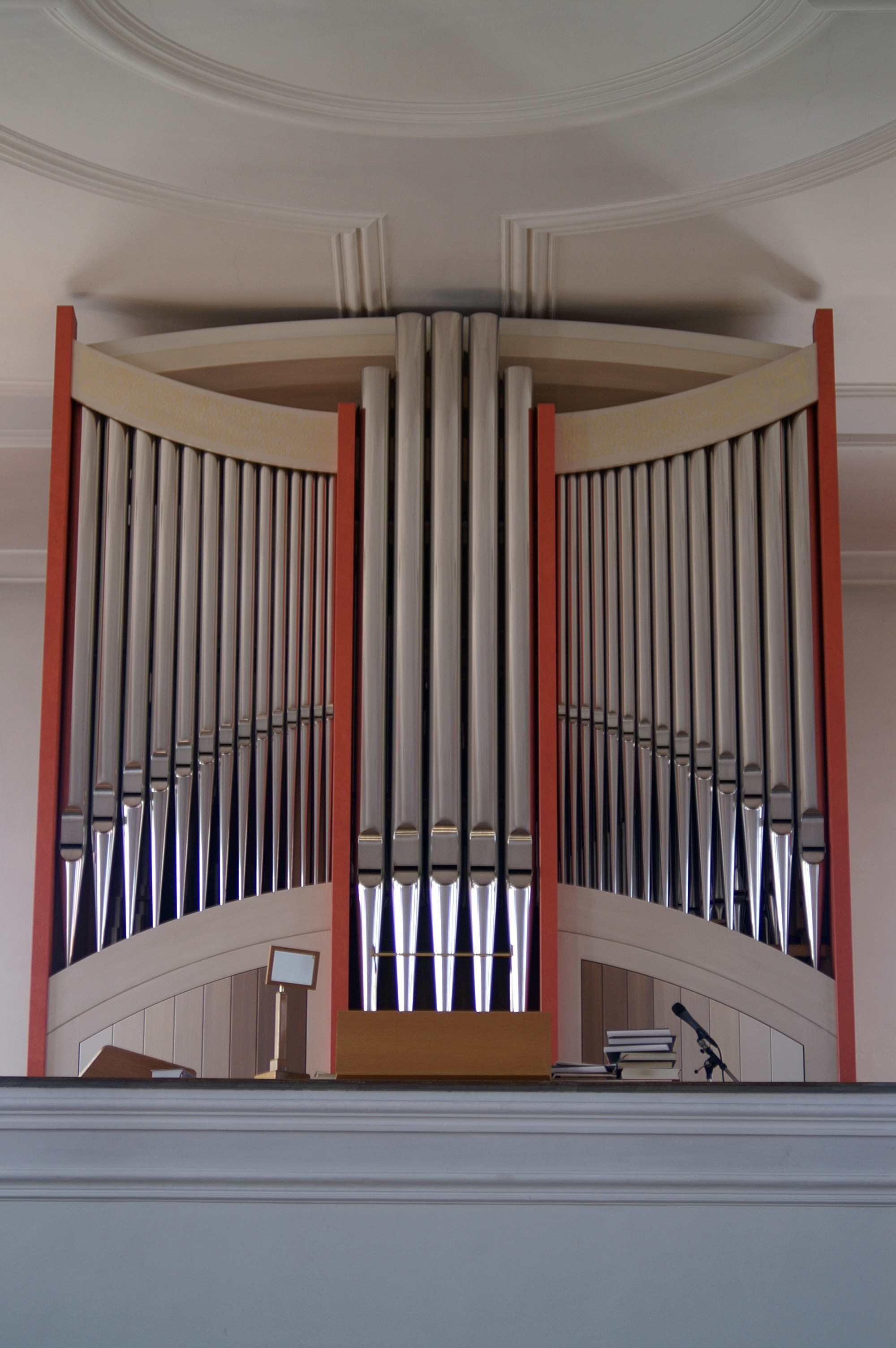 Orgel in Barbing, erbaut von Johannes Schädler